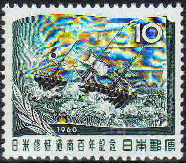 日米修好通商百周年記念切手のうち、咸臨丸を描く切手